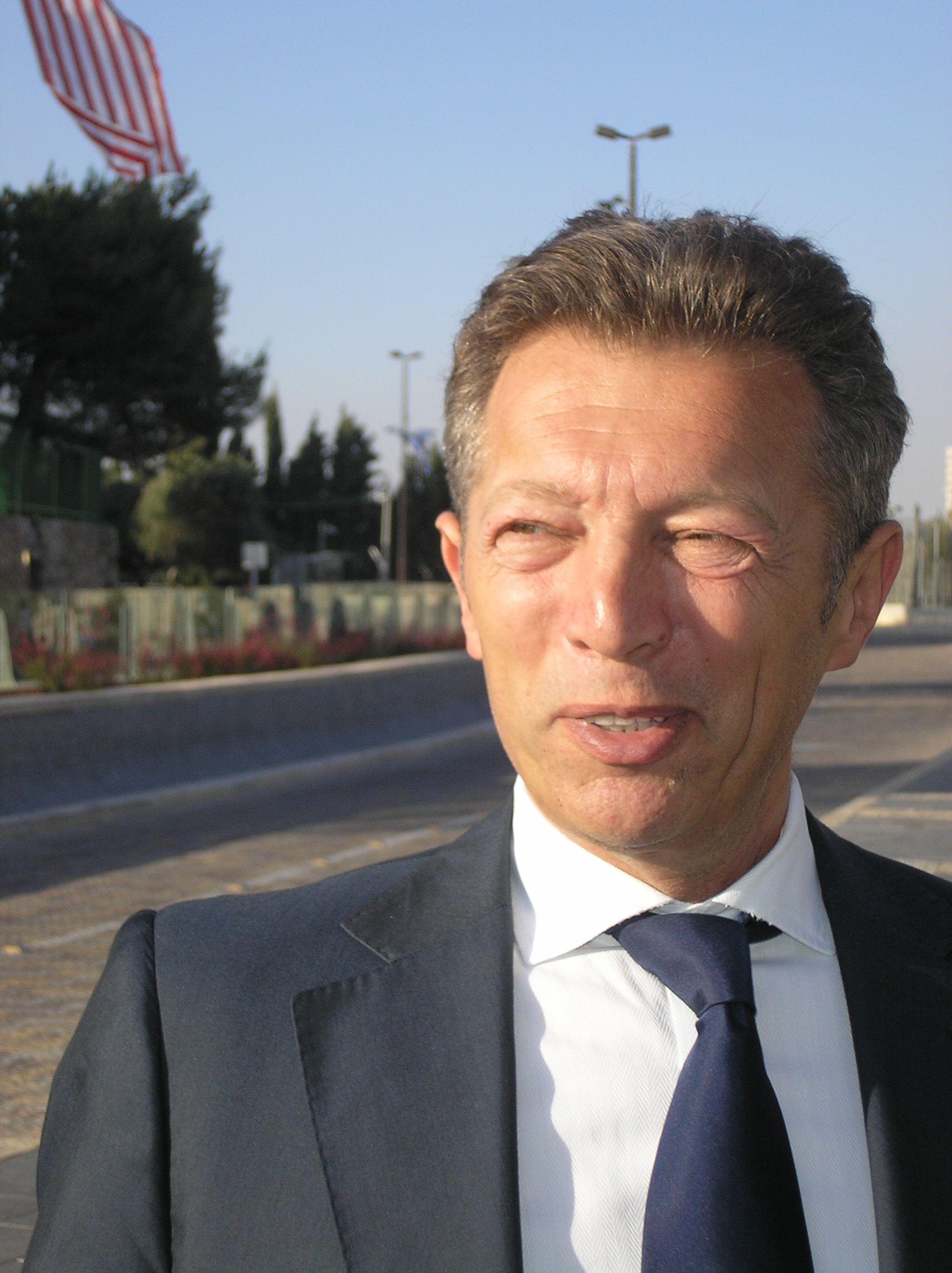 Arcadi Gaydamak